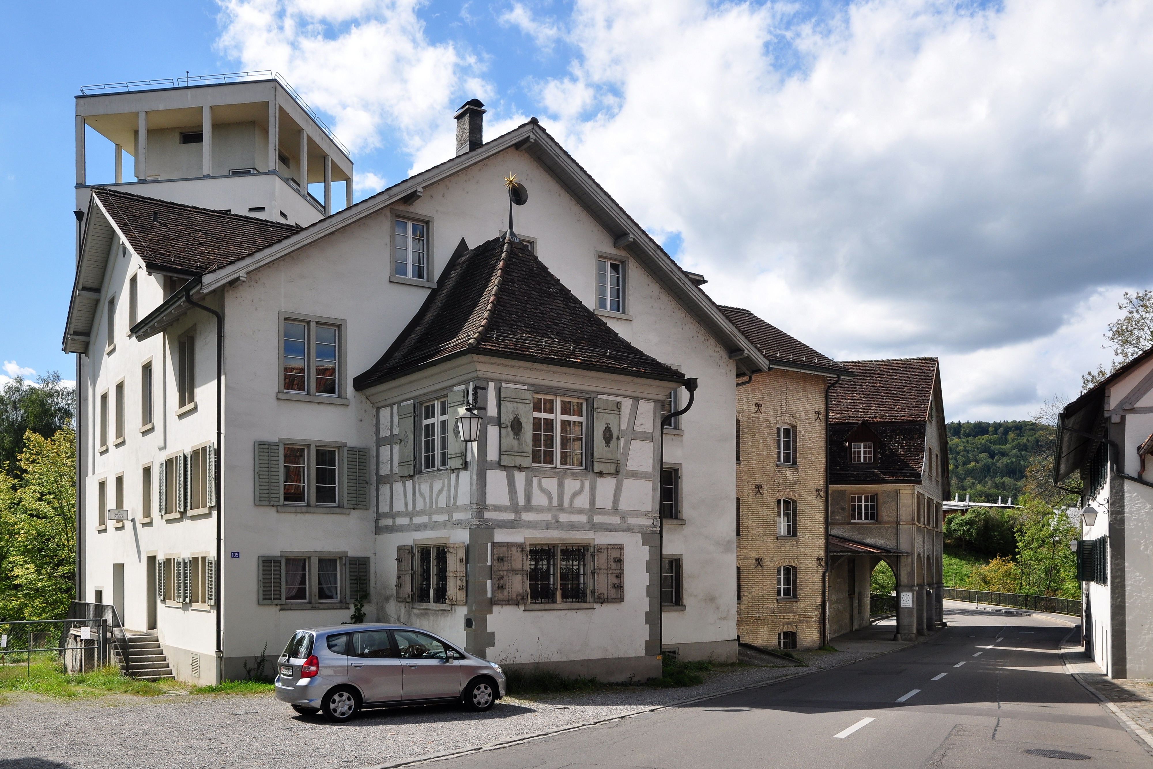 Wespi-Mühle, Wieshofstrasse 105 in Winterthur (Switzerland)